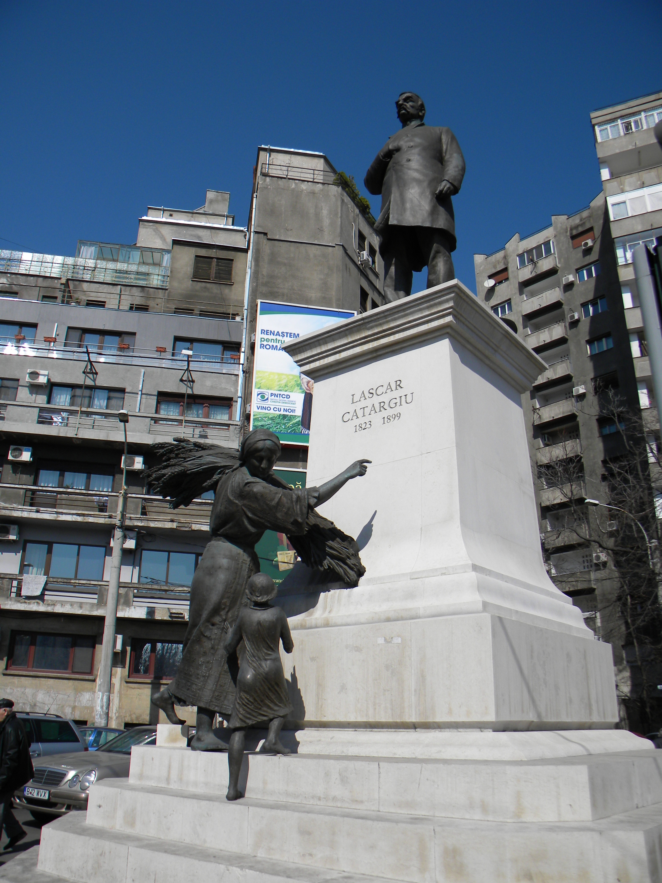 Bucuresti, Romania, Statuia lui Lascar Catargiu (1)